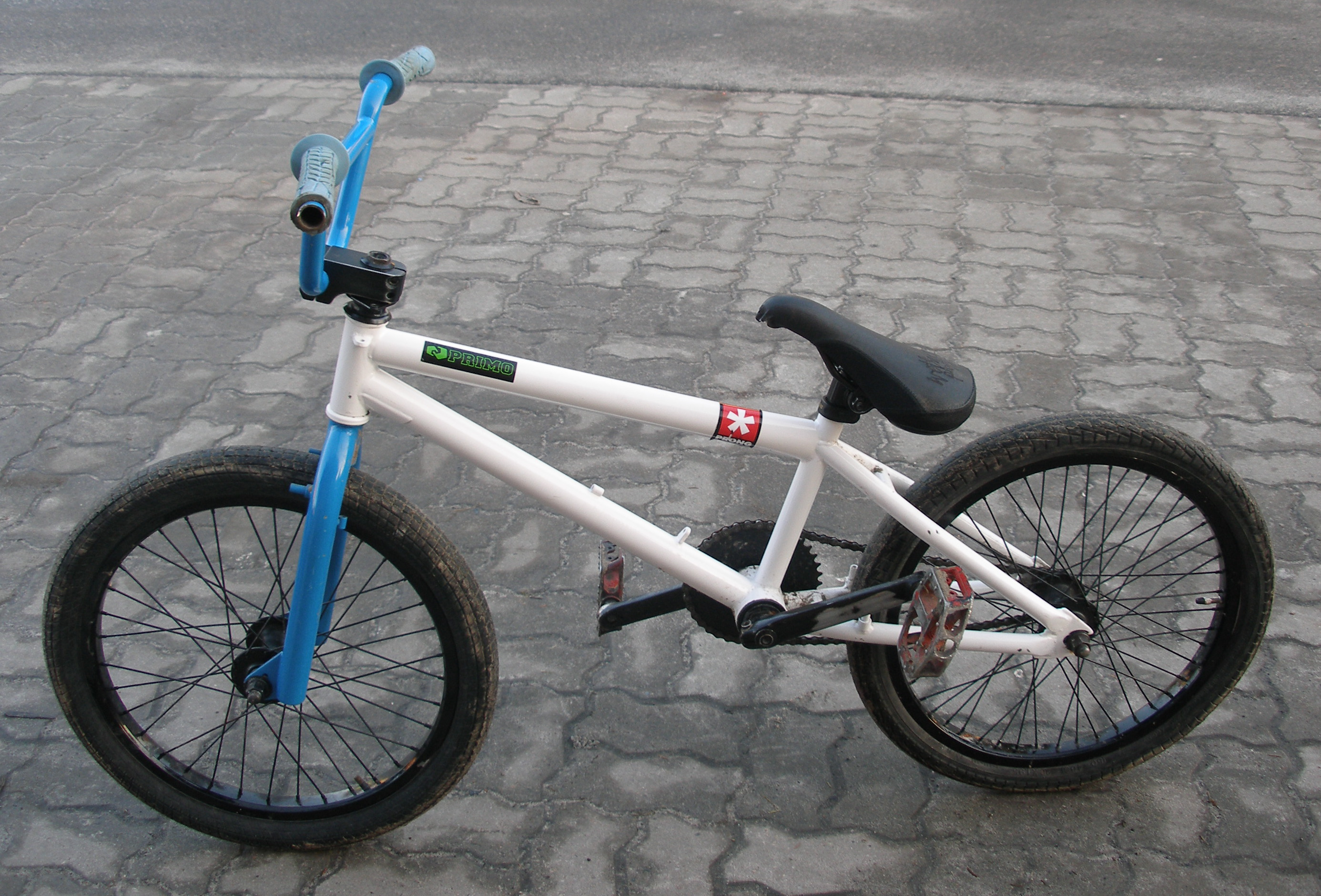 BMX firmy !, model Bold